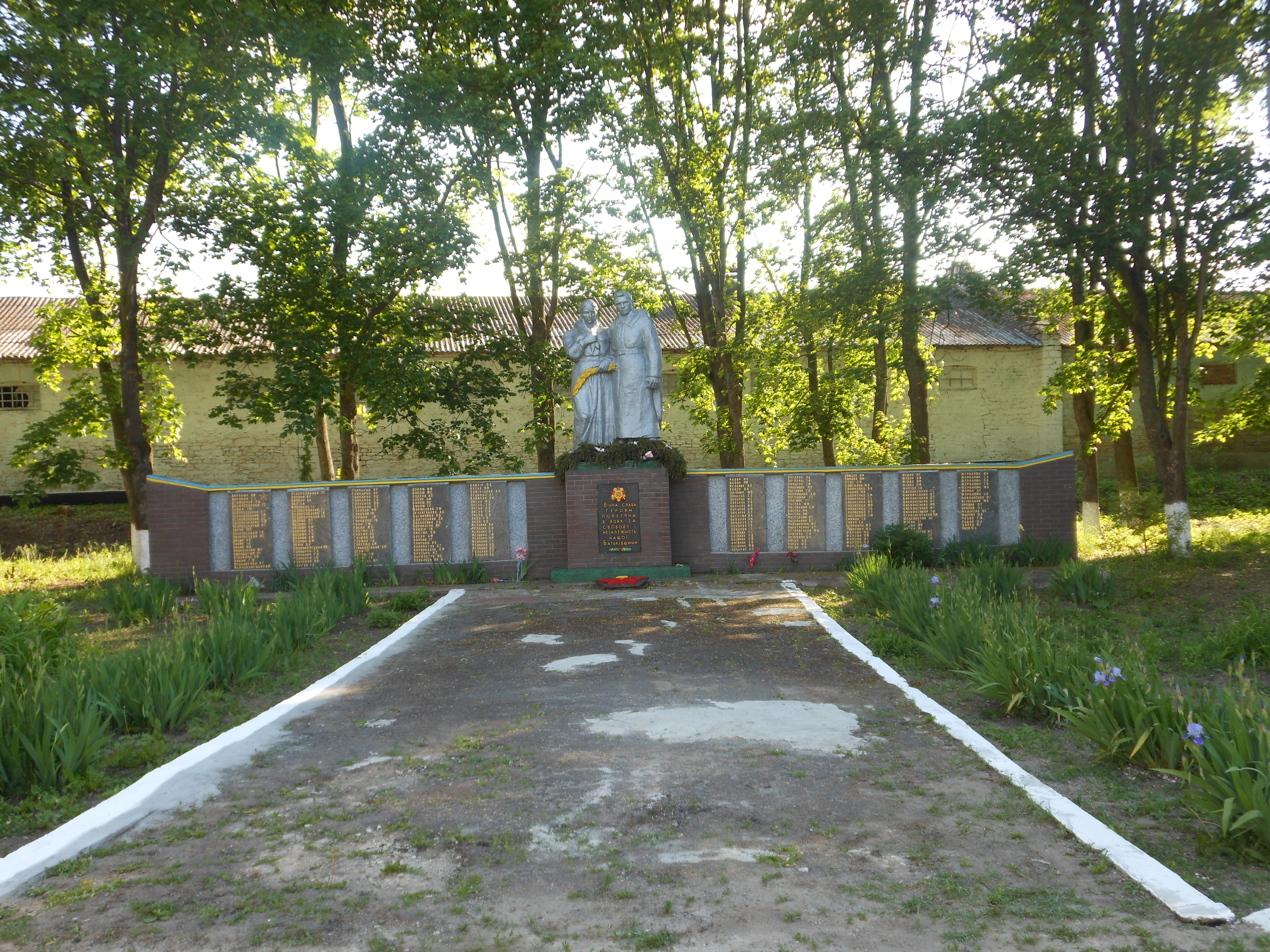 Пам’ятник 200 воїнам – односельчанам, загиблим на фронтах ВВВ, Котюжани, біля Будинку культури.